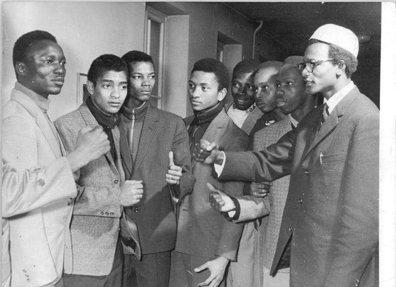 Leipzig, Studenten aus Mali Zentralbild Schaar 13.2.1960 Protest gegen Saharabombe. Eine Welle der Empörung und des Protestes löste die Nachricht von der Explosion der ersten französischen Atombombe in der Sahara unter den afrikanischen Studenten an der Leipziger Karl-Marx-Universität aus. UBz: Barry Seydou (rechts), ein Student aus der Mali-Föderation, wies mit erregten Worten darauf hin, dass sein Heimatort nur etwa 300 km von der Abwurfsstelle der französischen Atombombe entfernt ist, "die afrikanischen Völker brauchen keine Atombombe. Wir wollen in Frieden leben und fordern die sofortige Beendigung der Kolonialherrschaft in Afrika."